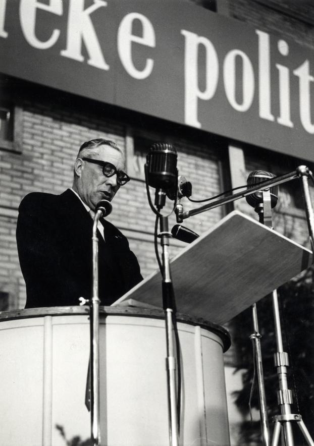 De heer E.H.A. (Evert) Kraaijvanger spreekt op het partijcongres van de KVP. Nederland, oktober 1955.